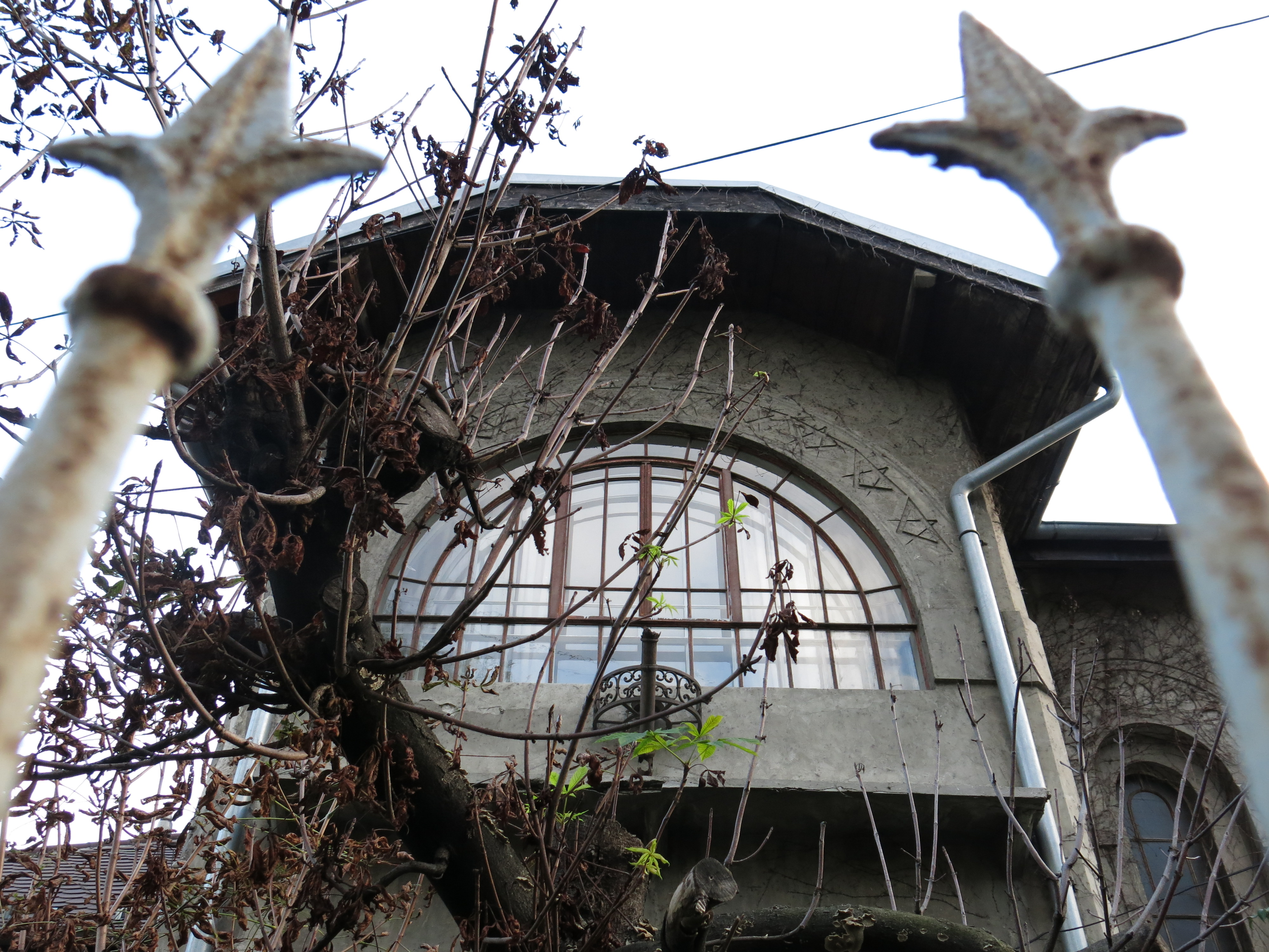 Кућа архитекте Момира Коруновића